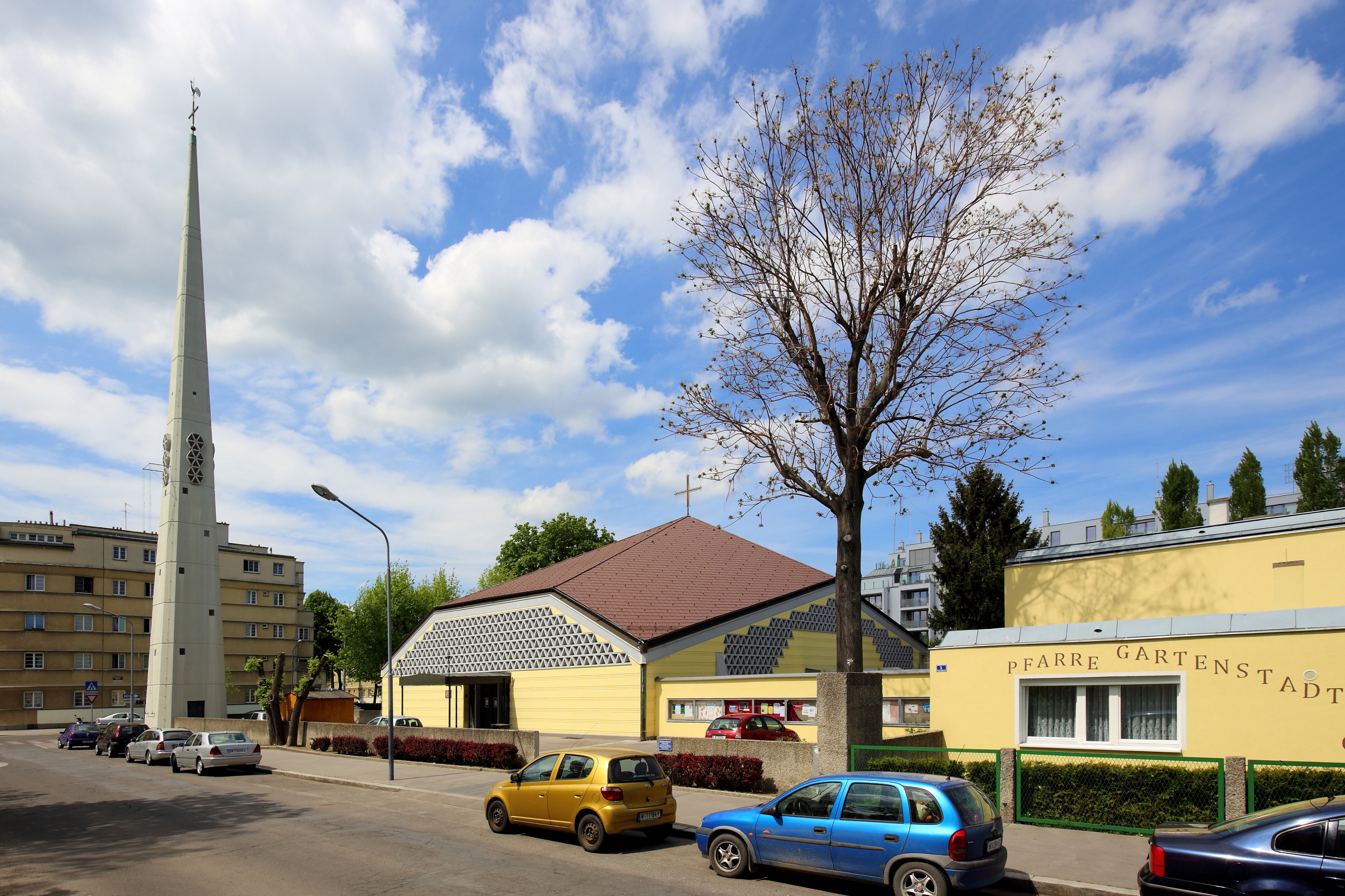 Die von 1962 bis 1964 nach Plänen von Alfons Leitl errichtete Pfarrkiche Blut Christi in Jedlesee, ein Ortsteil im 21. Wiener Gemeindebezirk Floridsdorf.